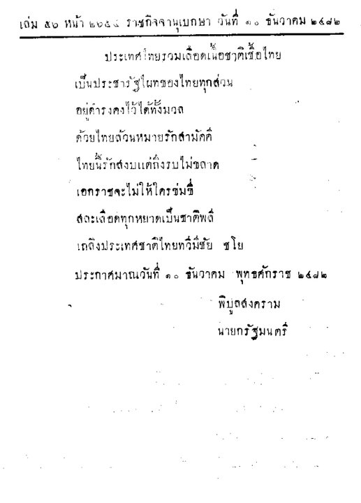 ประกาศสำนักนายกรัฐมนตรี ว่าด้วยรัฐนิยม ฉะบับที่ ๖ เรื่อง ทำนองและเนื้อร้องเพลงชาติ ลงวันที่ ๑๐ ธันวาคม พ.ศ. ๒๔๘๒ เนื้อหากล่าวถึงการรับร้องบทร้องเพลงชาติซึ่งประพันธ์โดย นายพันเอก หลวงสารานุประพันธ์ (นวล ปาจิณพยัคฆ์) ในนามกองทัพบกไทย โดยยึดถือตามทำนองเพลงเดิมของพระเจนดุริยางค์ (ปิติ วาทยะกร) ที่มา: ราชกิจจานุเบกษา, ประกาศสำนักนายกรัฐมนตรี ว่าด้วยรัฐนิยม ฉะบับที่ ๖ เรื่อง ทำนองและเนื้อร้องเพลงชาติ, เล่ม ๕๖, ตอน ๐ ง, ๑๐ ธันวาคม พ.ศ. ๒๔๘๒, หน้า ๒๖๕๓